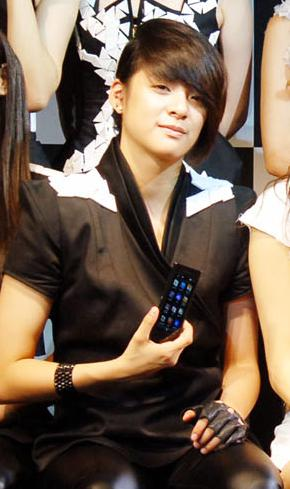 뉴 초콜릿폰 쇼케이스